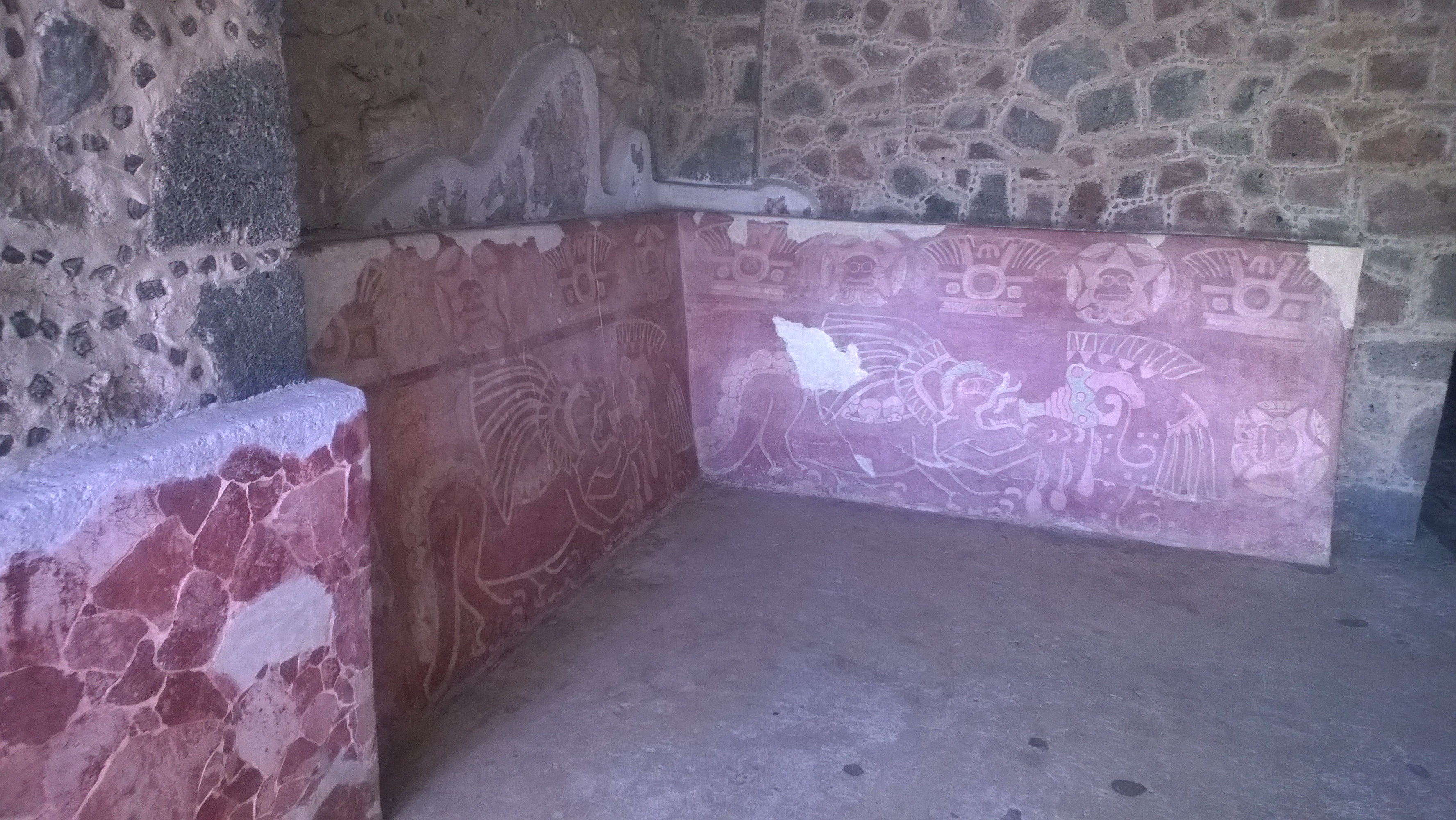 Teotihuacan